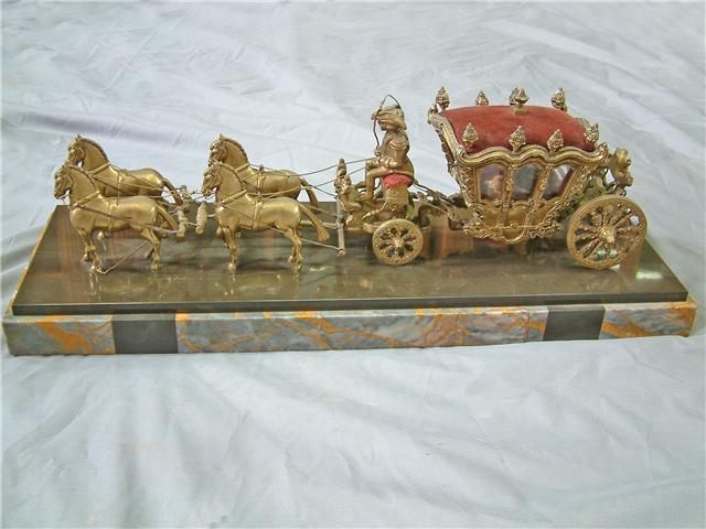 Miniatura de Coche D.Joao V ; local de exibiçao Museu Militar